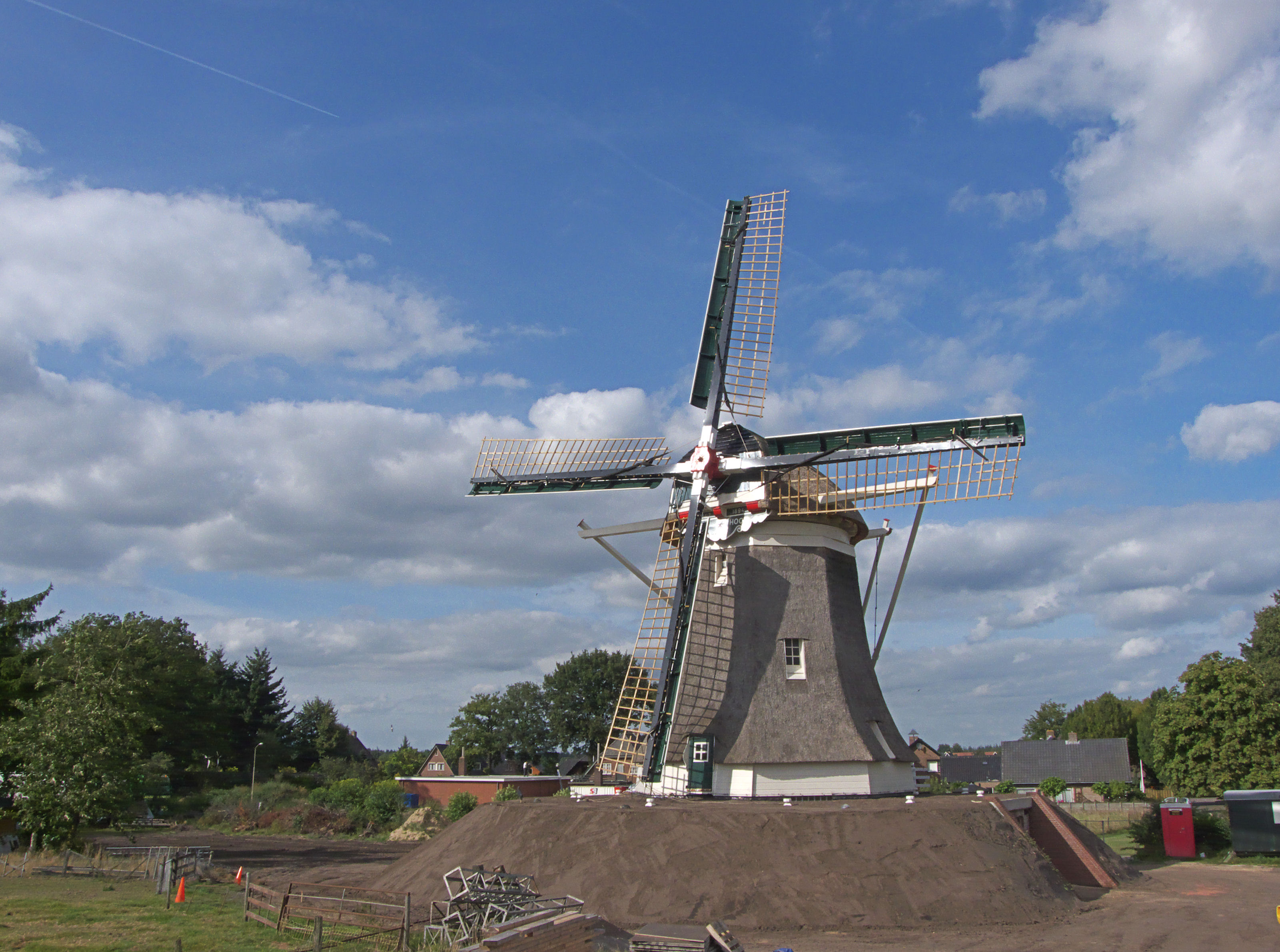 Molen De Hoop, Elspeet